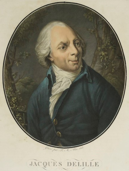 Estampe de l'abbé Jacques Delille (1738-1813)